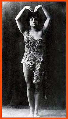 Эротическая (до 1920 года) танцовщица Кариатис (Элизабет Тулемон) куртизанка, получившая известность как исполнительница и заказчик балета Эрика Сати Прекрасная истеричка